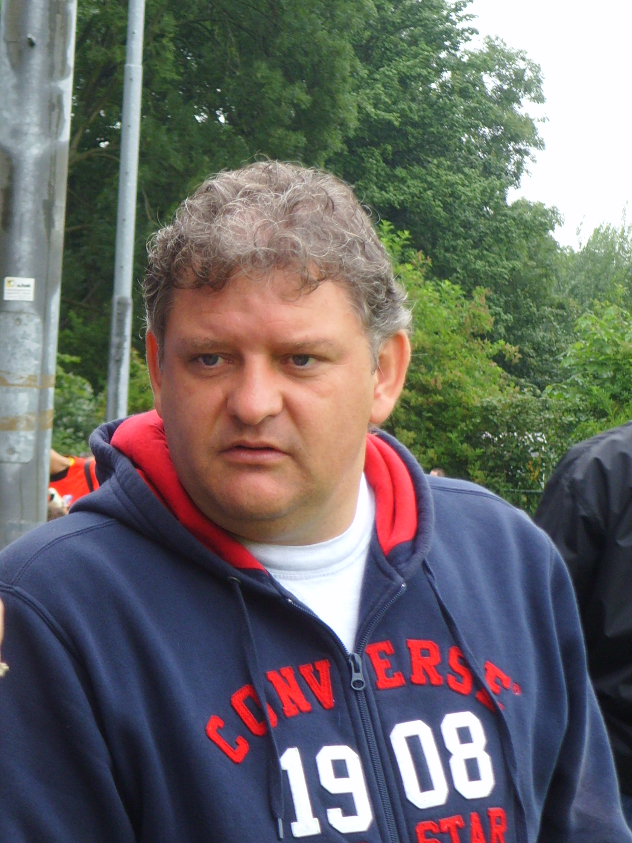 René van den Berg, Nederlands televisiepresentator, tijdens de eerste training van het seizoen 2008-2009 van FC Utrecht